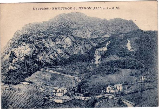 Carte postale de l'Ermitage à Saint-Martin-le-Vinoux (antérieur à 1913)